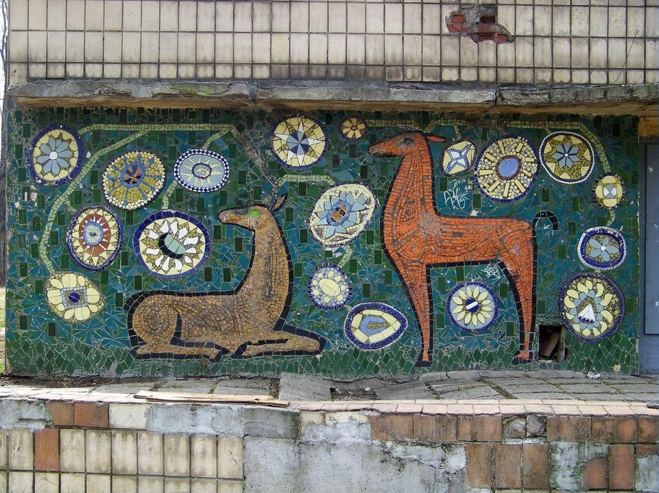 Мозаїка "Життя" на школі № 5 у місті Донецьку.